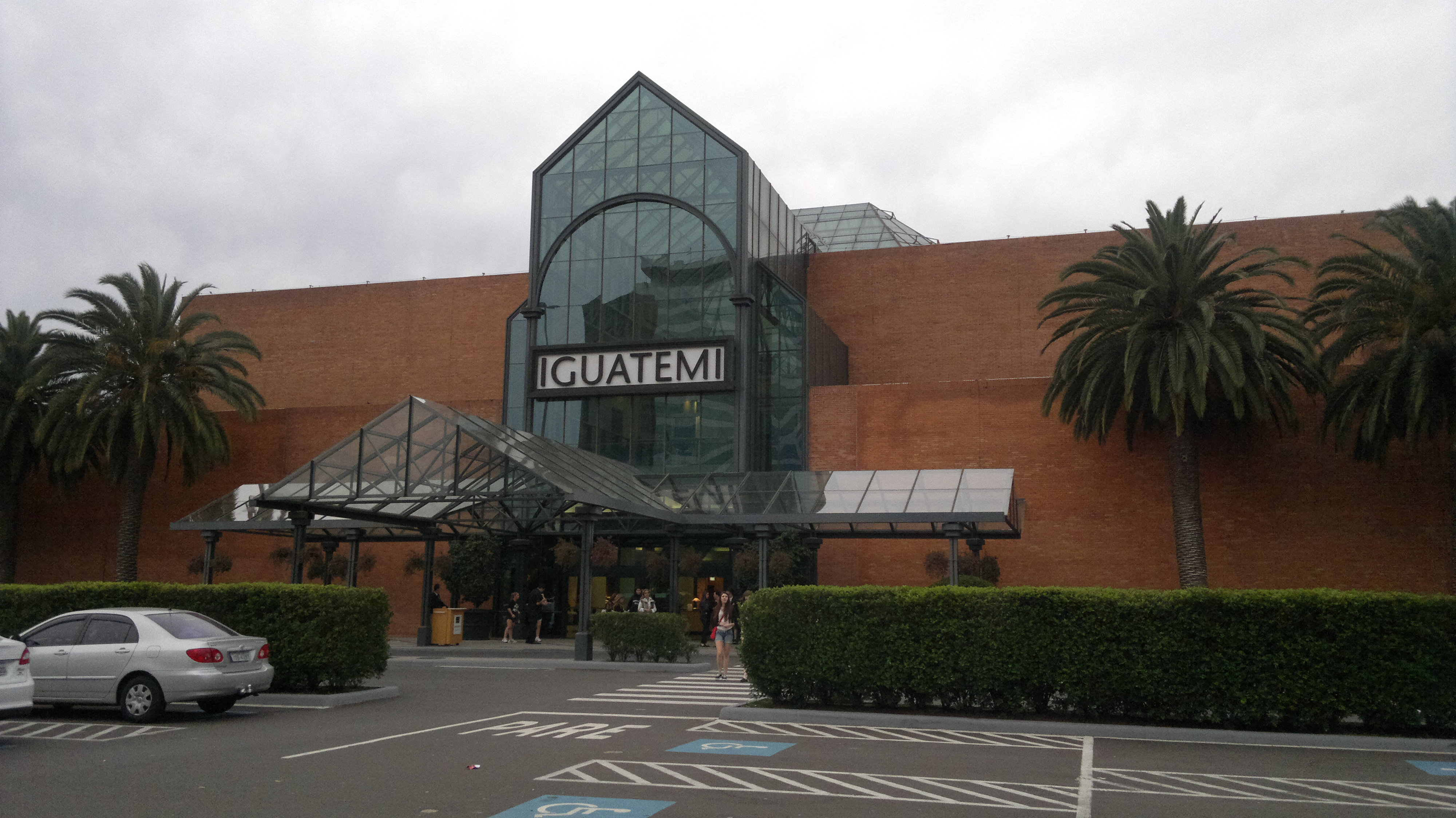 Iguatemi, Porto Alegre-RS